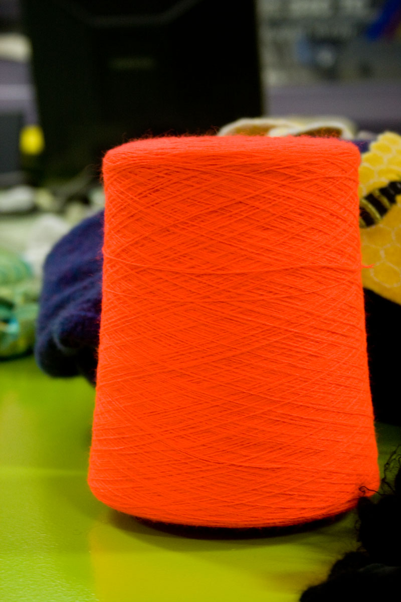 Knit and Wear vlakbreimachine, H, Stoll & Co. (Reutlingen), 2007 (13066) klosje voor breimachine